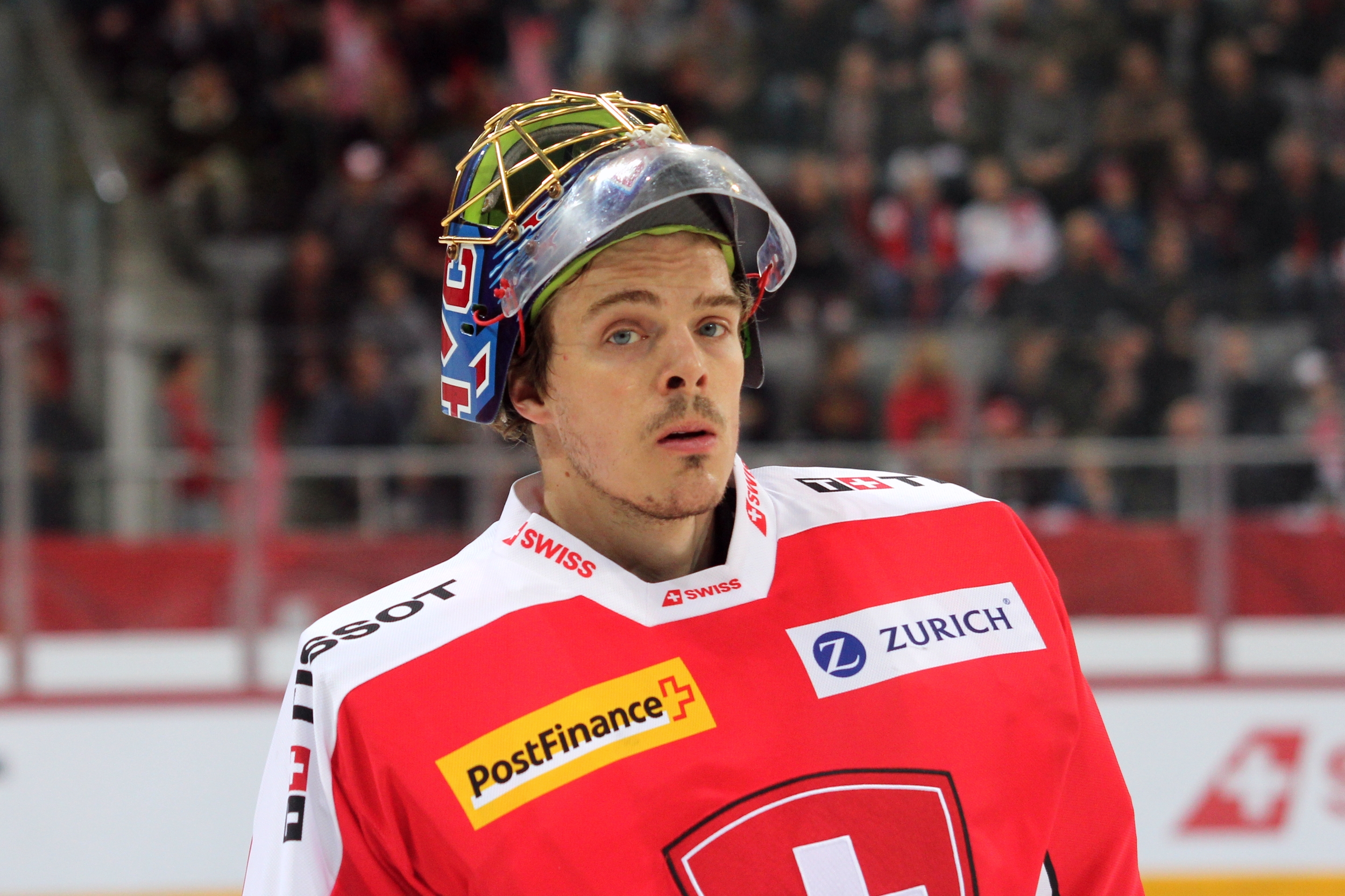 Jonas Hiller (S 1).